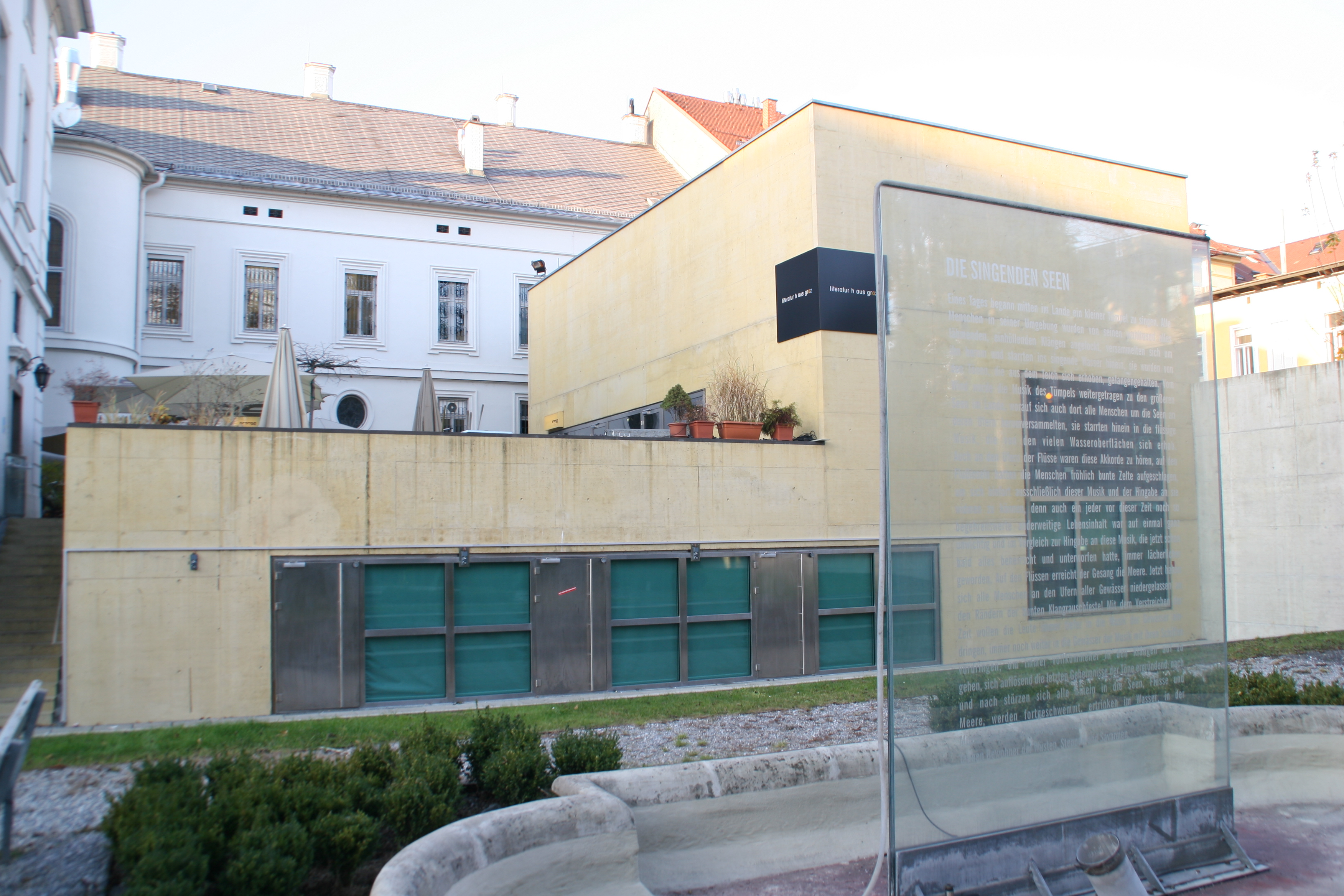 Literaturhaus Graz, Hofseite. Wortwasserfall von Gerhard Melzer, Stefan Schwar, Alexander Kada